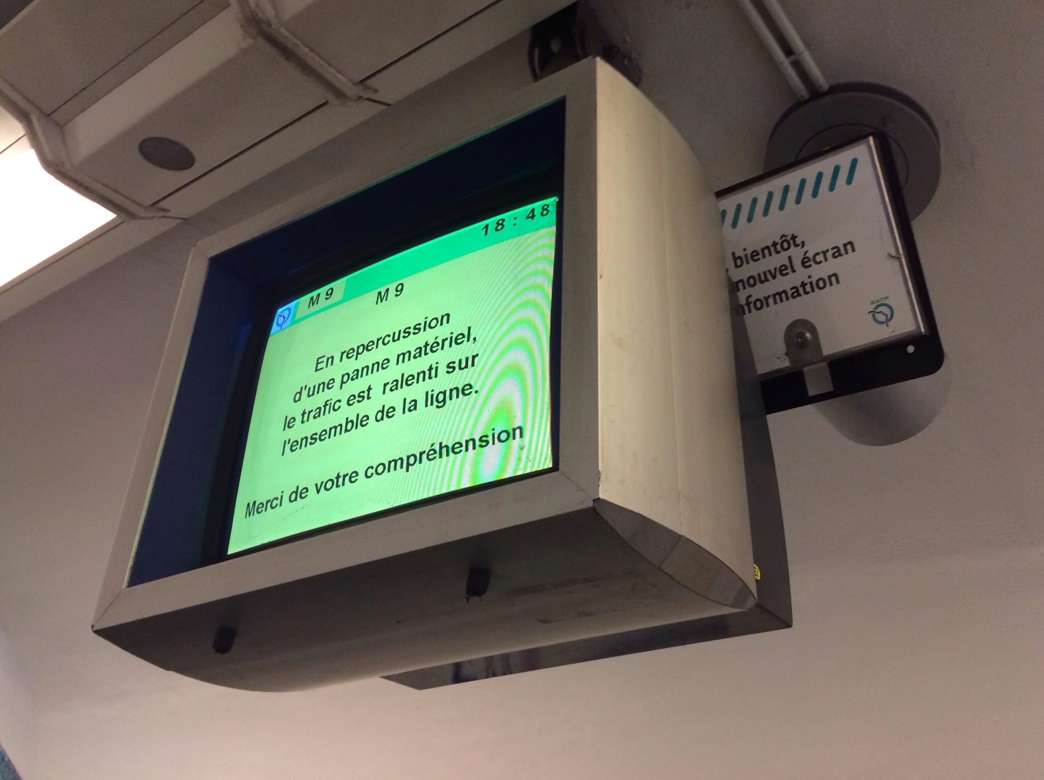 Nouveaux ecrans IMAGE - installation